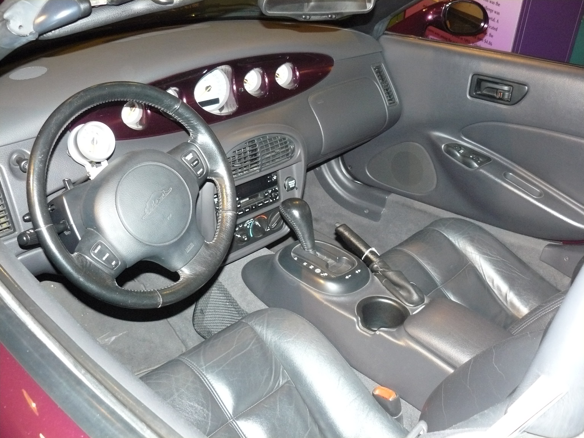 Auburn 2013